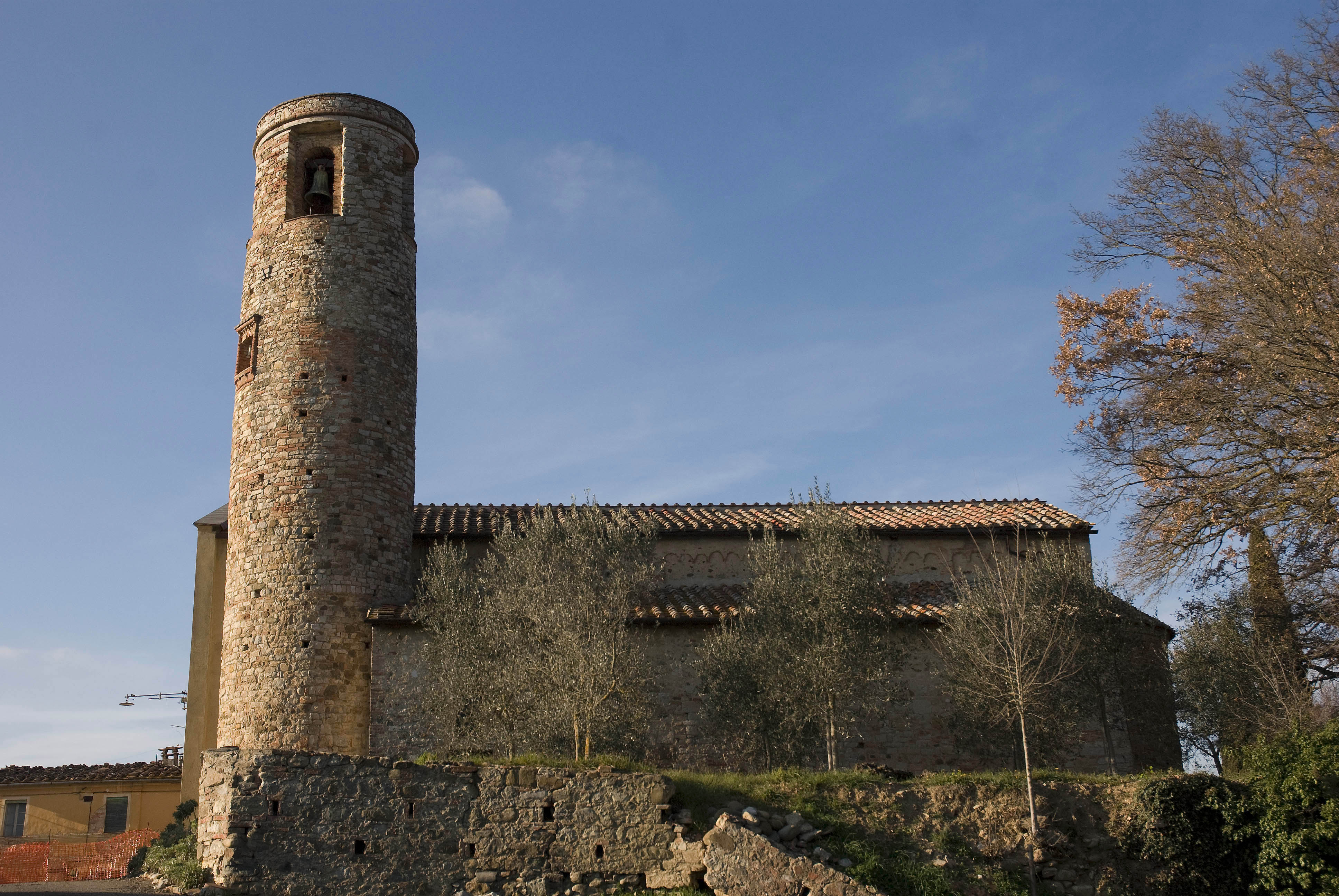 Pieve di Santa Maria a Pacina